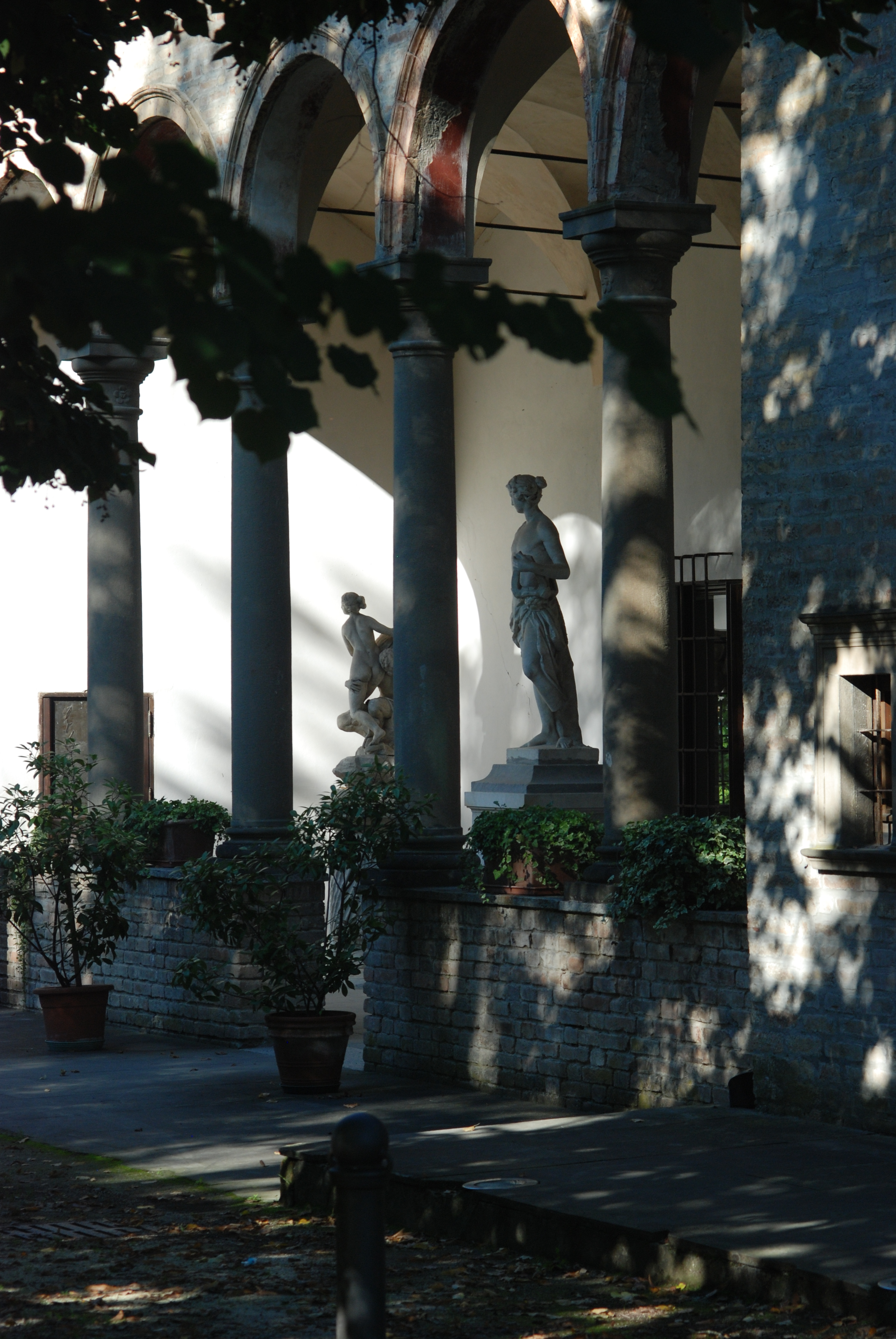 Palazzetto Eucherio Sanvitale ingresso, statue di Satiro e Naiade di Jean Baptiste Boudard (1753) e Apollo con cetra di J.B. Boudard (1754) This is a photo of a monument which is part of cultural heritage of Italy.